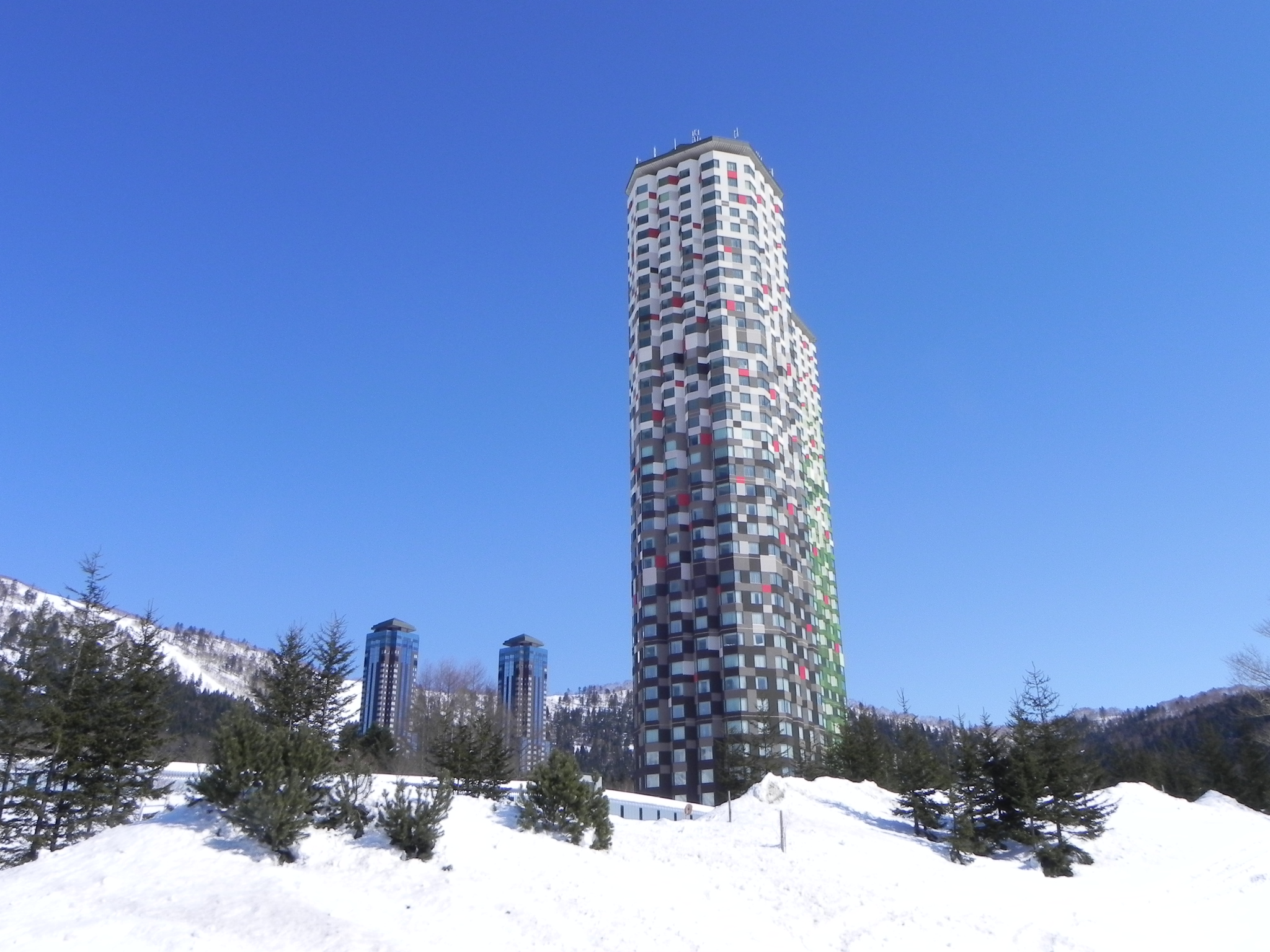 トマム・ツインタワー（Tower Hotel）